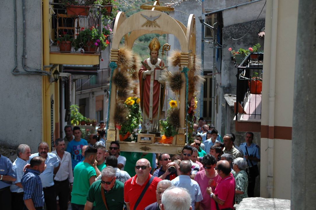 PROCESSIONE DI SAN BASILIO MAGNO,PRESSO SAN BASILIO DI GALATI MAMERTINO (ME) " FERCOLO ADDOBBATO CON I TRADIZIONALI BASTONI DI BASILICO E MAZZI DI SPIGHE.